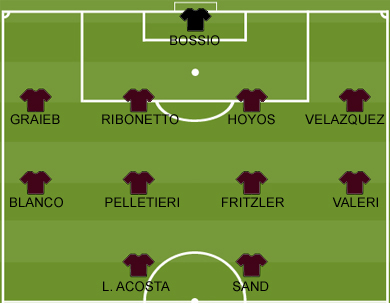 LanusCampeon2007b